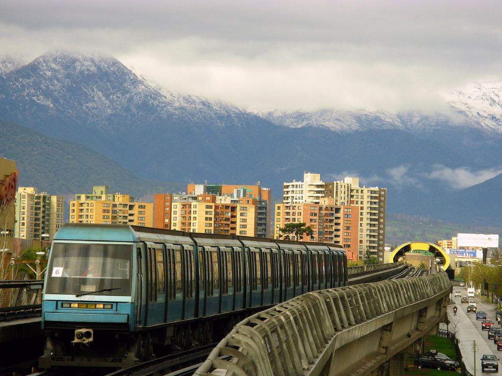 Después de una copiosa lluvia y un extenuante día de estudio, lo más rico es quedarse en la estación viendo pasar los trenes en una ciudad que, temporalmente, se despidió de esa nube tóxica que la cubría. Interestación Pedrero-Mirador Línea 5, Metro de Santiago (Chile) Automotor NS-93 'N2055'